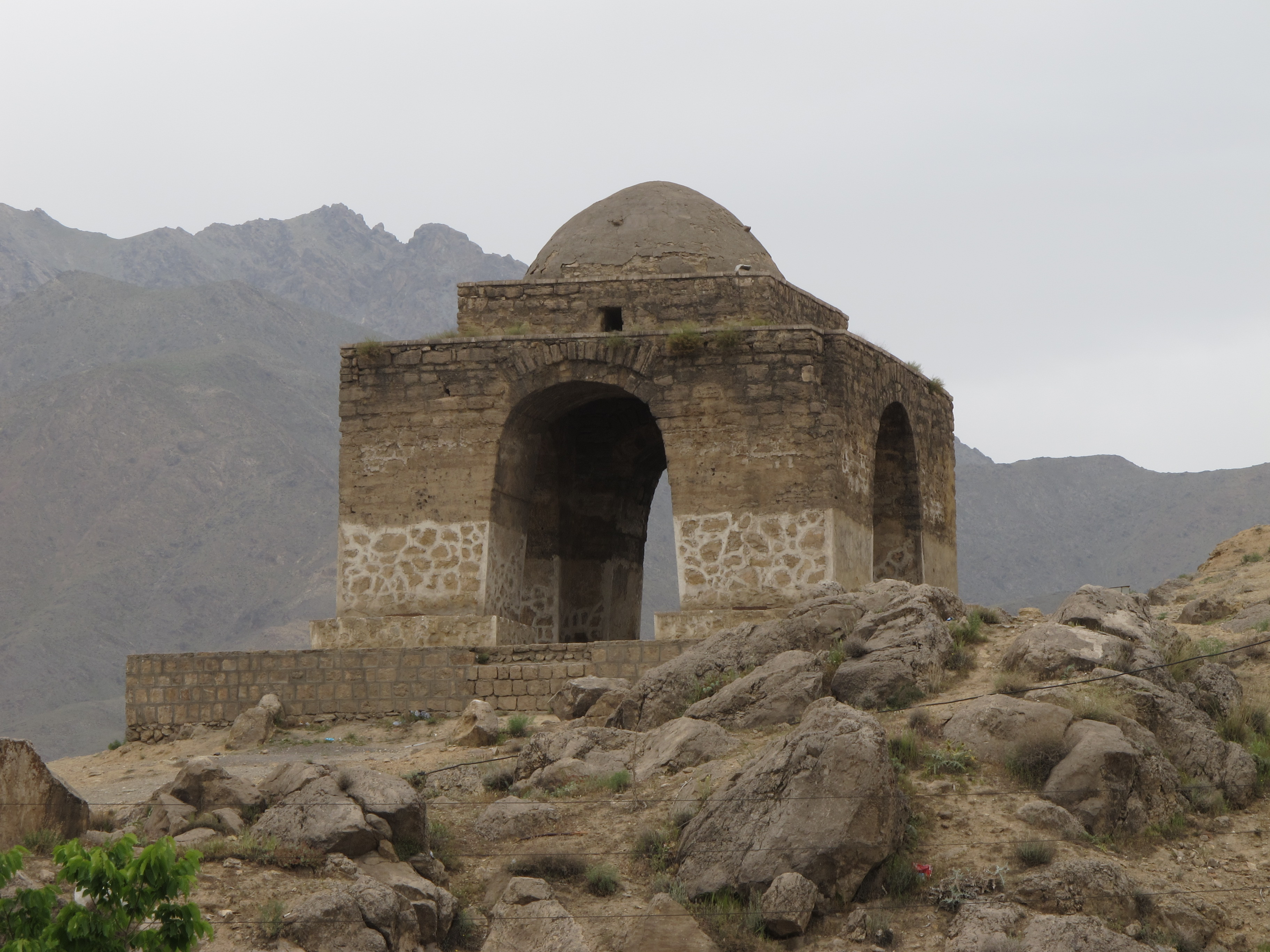 Niasar Fire Temple, Kashan, Isfahan Province, Iran